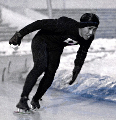 Kunio Nando